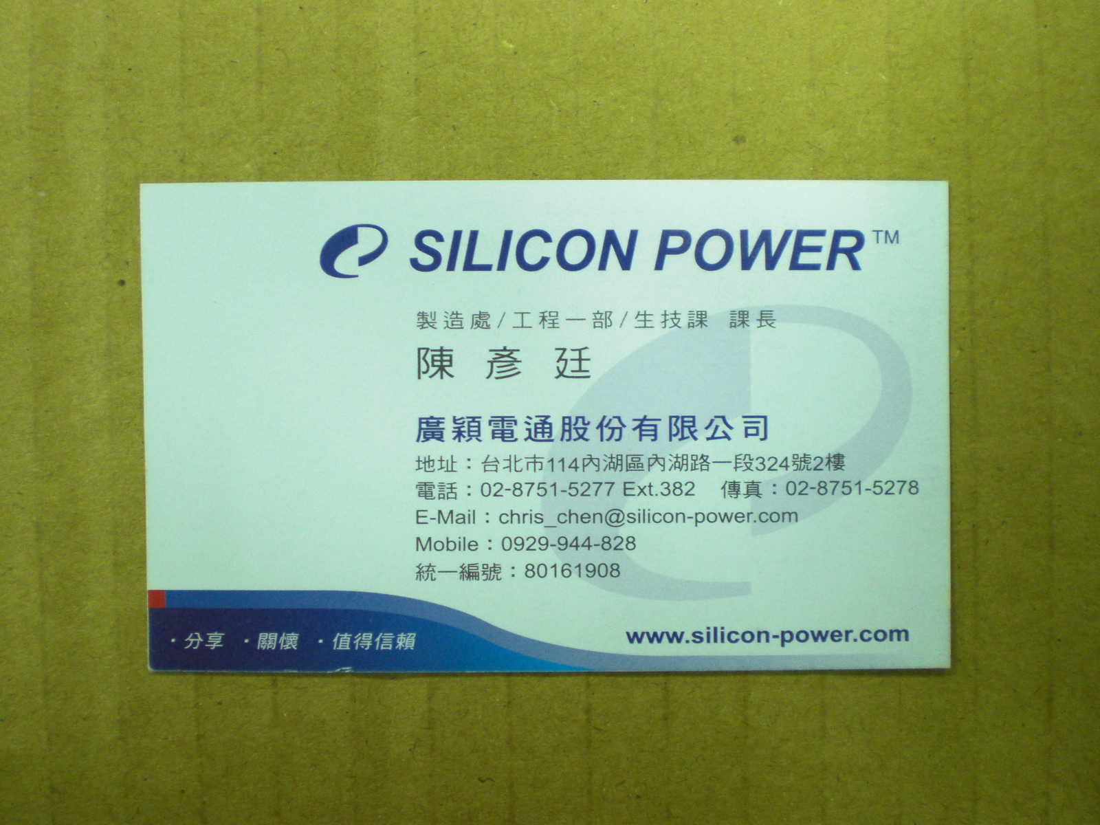 廣穎電通員工名片2011年1月版正面